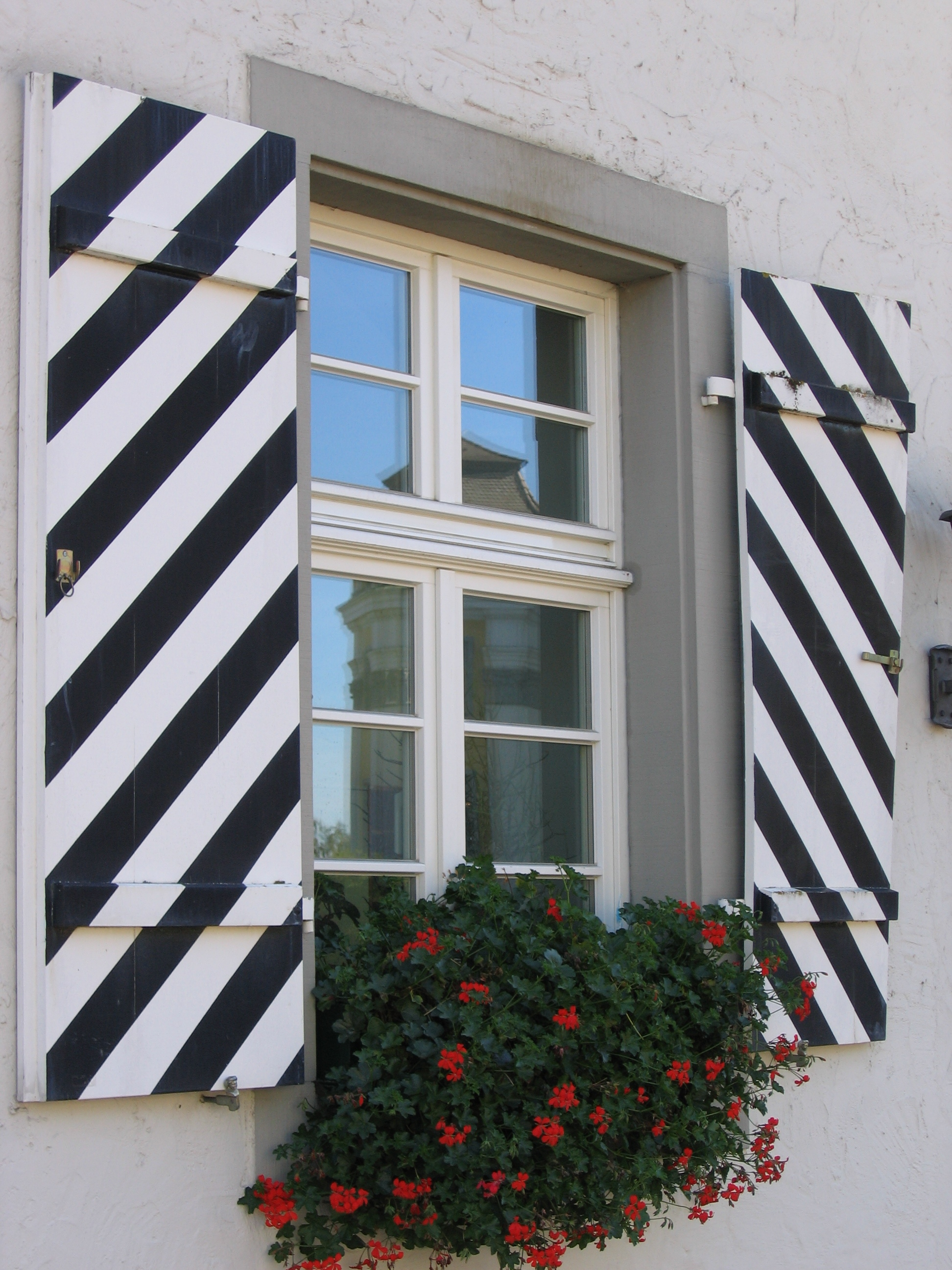 Deutschland - Baden-Württemberg - Bodenseekreis - Tettnang: Altes Schloss, heute Rathaus; Fenster